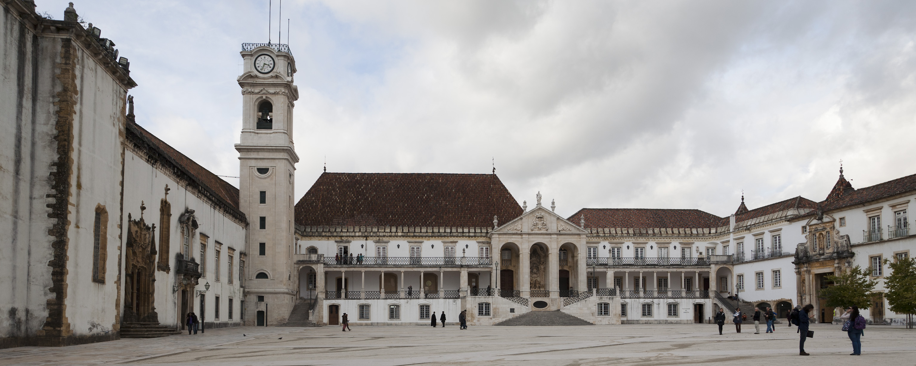 Paço das Escolas, Universidade de Coimbra